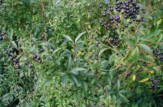 Ligustrum vulgare: Berries and leaves.